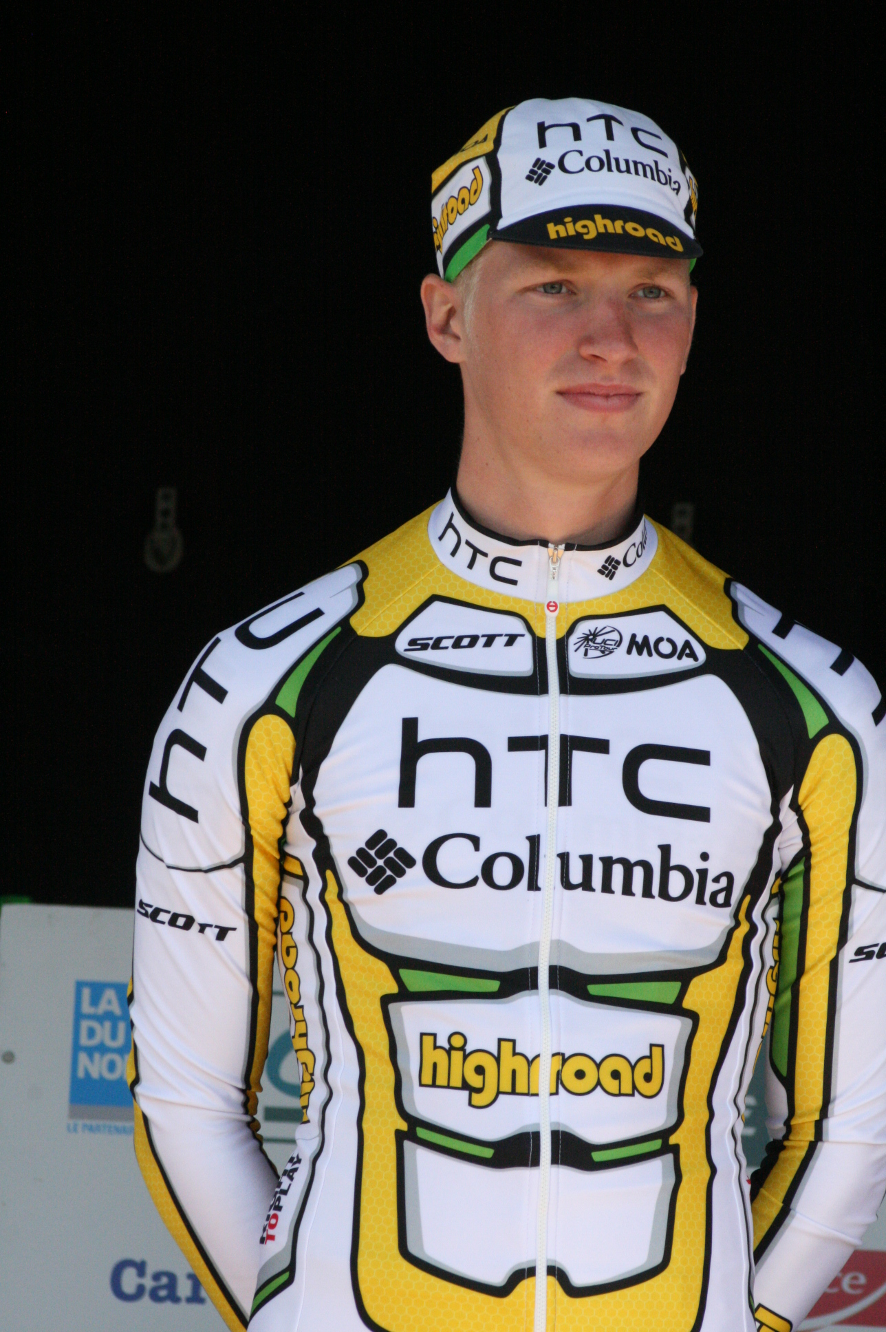 Gert Dockx, lors de la présentation des équipes des 4 jours de Dunkerque 2010